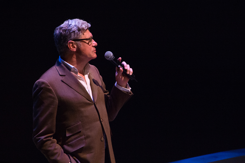 Nicolas Chaudun prononçant une conférence à Montréal à l'occasion de l'ouverture de l'exposition Des chevaux et des hommes, dont il était l'un des commissaires